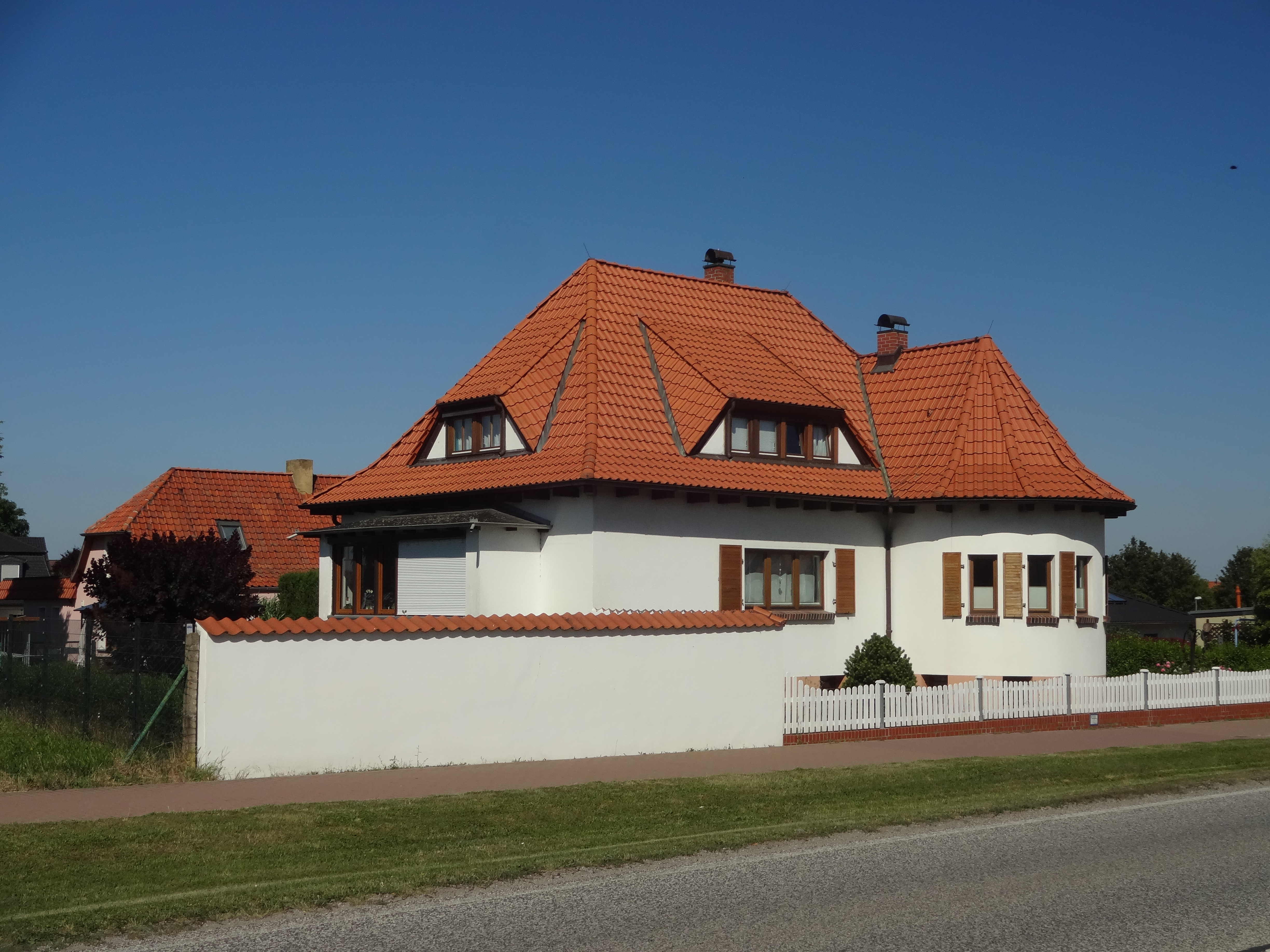 denkmalgeschützte Villa in der Halberstädter Straße 8 in Harsleben